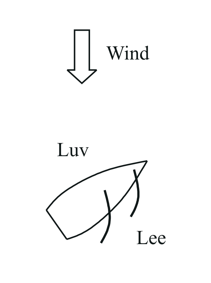 Luvseite (dem Wind zugewandte Seite) und Leeseite (vom Wind abgewandte Seite) eines Schiffes